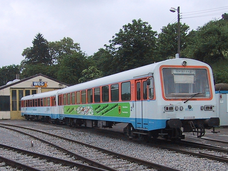 NE'81-Garnitur im Bahnhof Weissach